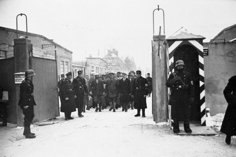 Dachau, Konzentrationslager Zentralbild Entlassung von etwa 600 Häftlingen aus dem faschistischen Konzentrationslager Dachau in Bayern zu Weihnachten 1933. U.B.z.: ein zur Entlassung kommender Trupp von ca. 50 bis 60 Häftlingen am Lagertor.